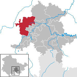 Königsee im Landkreis Saalfeld-Rudolstadt, Thüringen